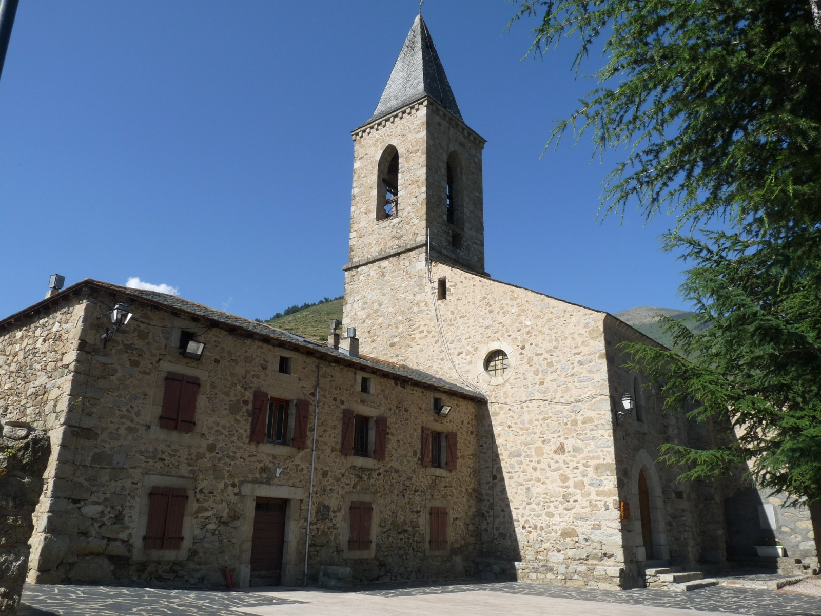 Mairie et nouvelle église, Sansa, Pyrénées-Orientales, France